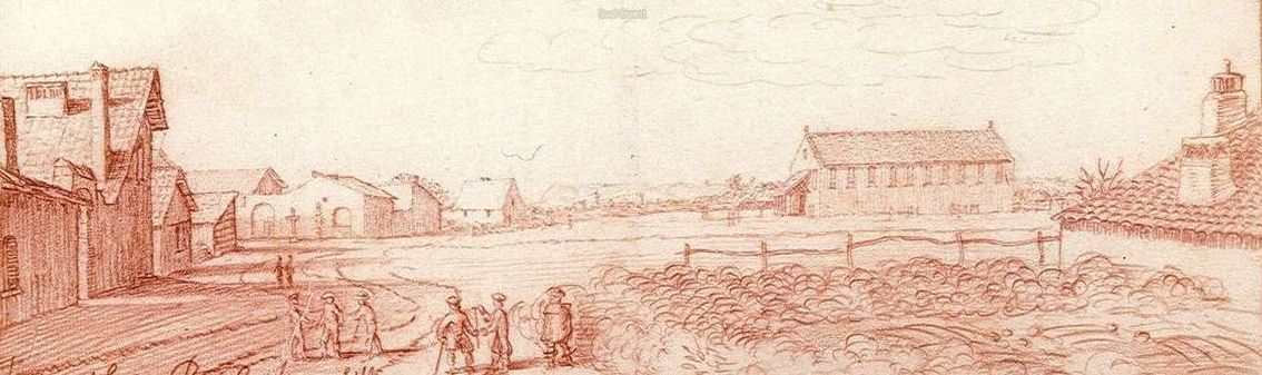 Dessin à la sanguine